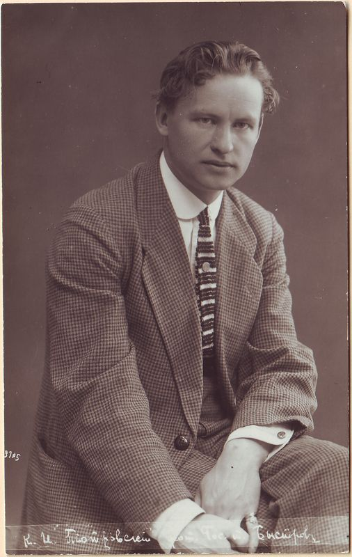 Kipras Petrauskas (1885 m. lapkričio 23 d. Ceikiniuose, Švenčionių apskritis, Rusijos imperija – 1968 m. sausio 17 d. Vilniuje) – žymus Lietuvos dainininkas (tenoras), operose sukūręs apie 80 vaidmenų, profesorius, Lietuvos meno kūrėjų draugijos narys. Su K. Petrausku siejamas nacionalinės operos įkūrimas.